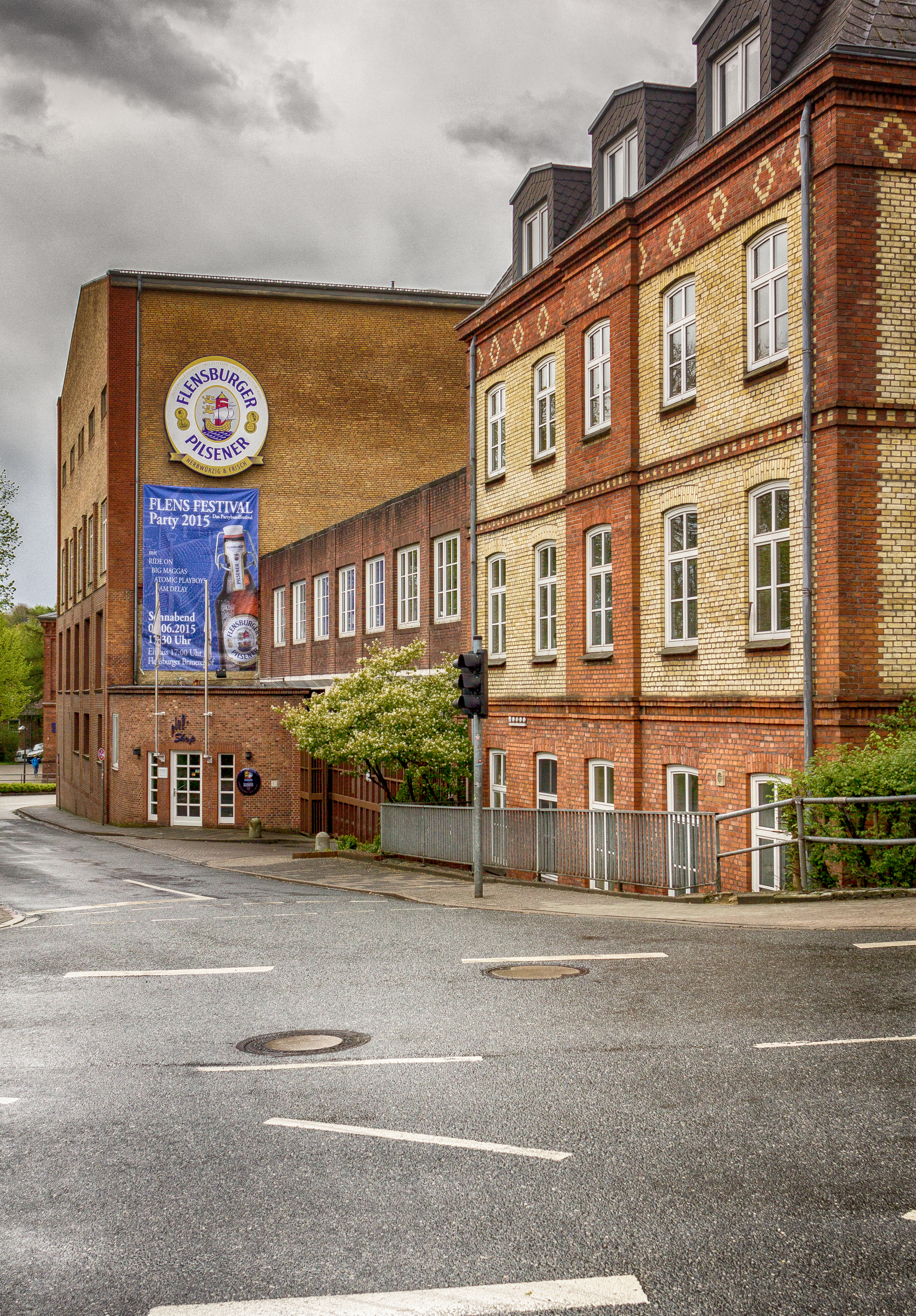 Flensburger Brauerei, Eingangsbereich , 2015.